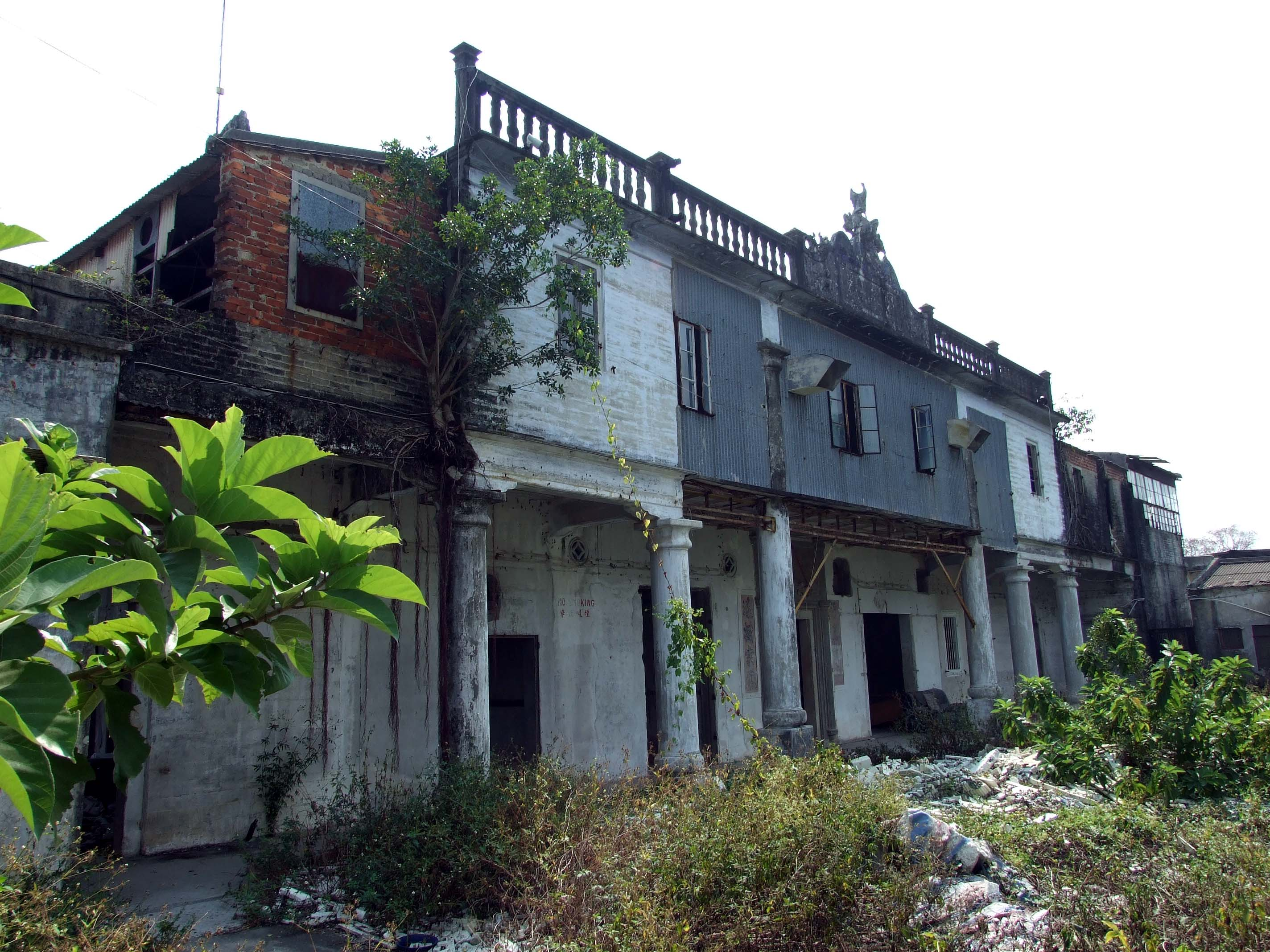 中文（香港）: 元朗八鄉江廈圍主樓